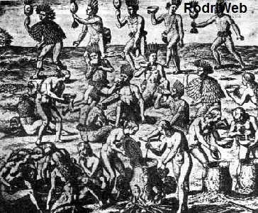 La preparación por parte de guaraníes de una bebida que embriaga llamada Ka'u'y que solo era tomada con moderación por parte de mayores. Dibujo de Levy.